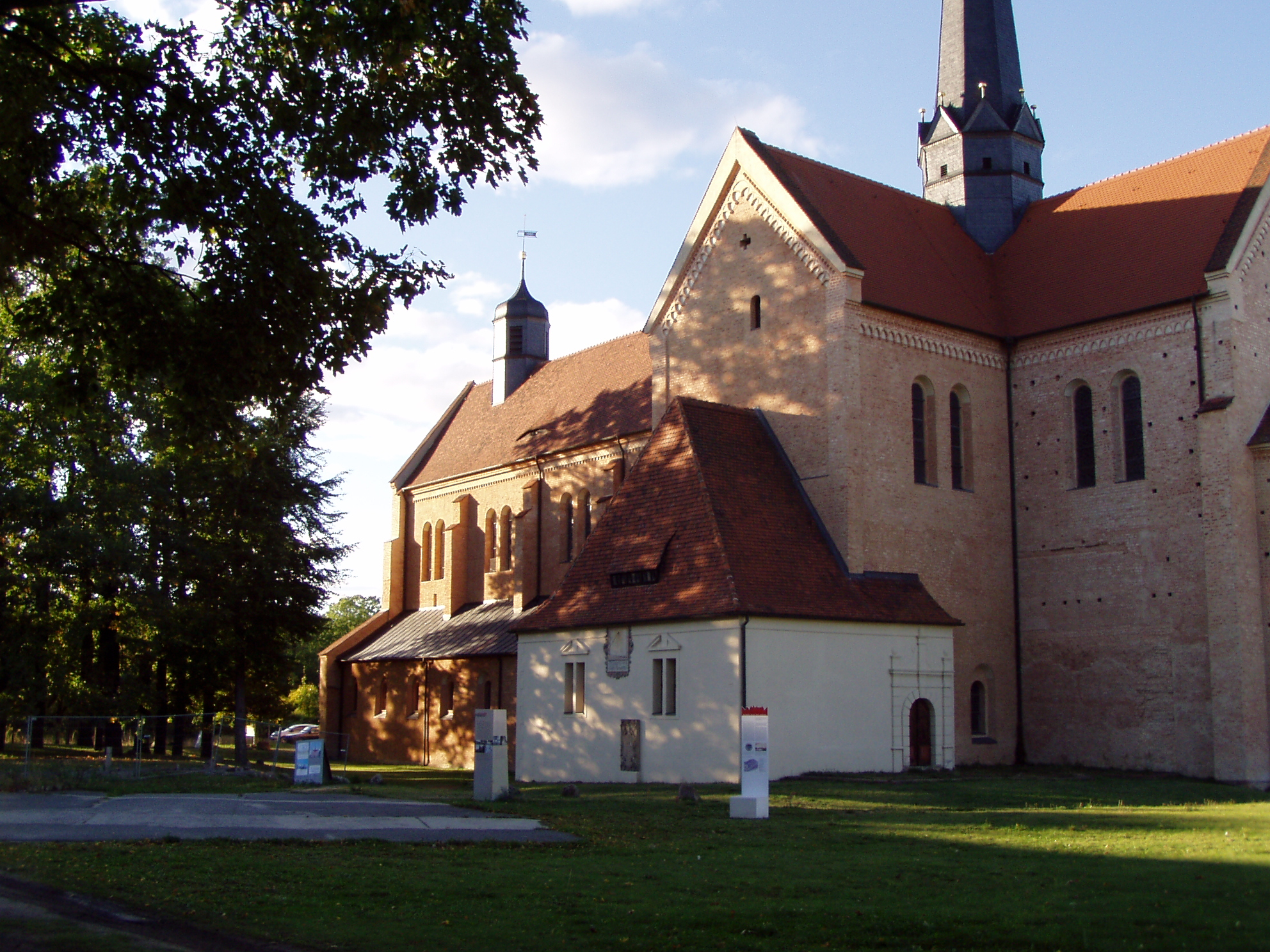 Teilansicht der sanierten Klosterkirche bzw. Schlosskirche Doberlug im Reformationstil auf dem Schlossgelände in Doberlug-Kirchhain. Das danebenliegende Schloss hat 4 Flügel.